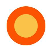 A Portfolio online gazdasági újság logója 2018-ban.